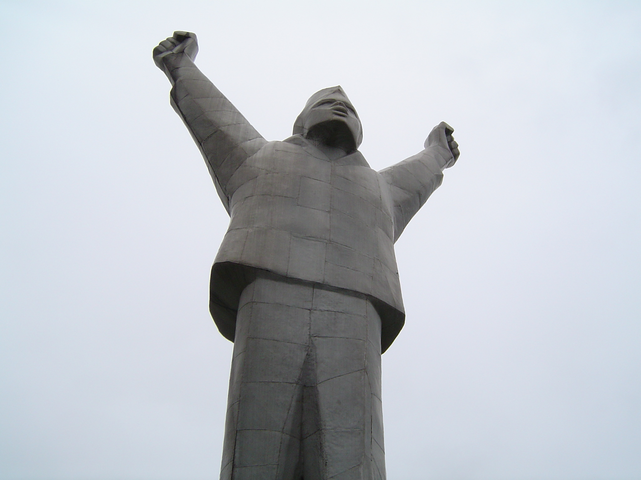 Monument to Stjepan-Stevo Filipović in Valjevo